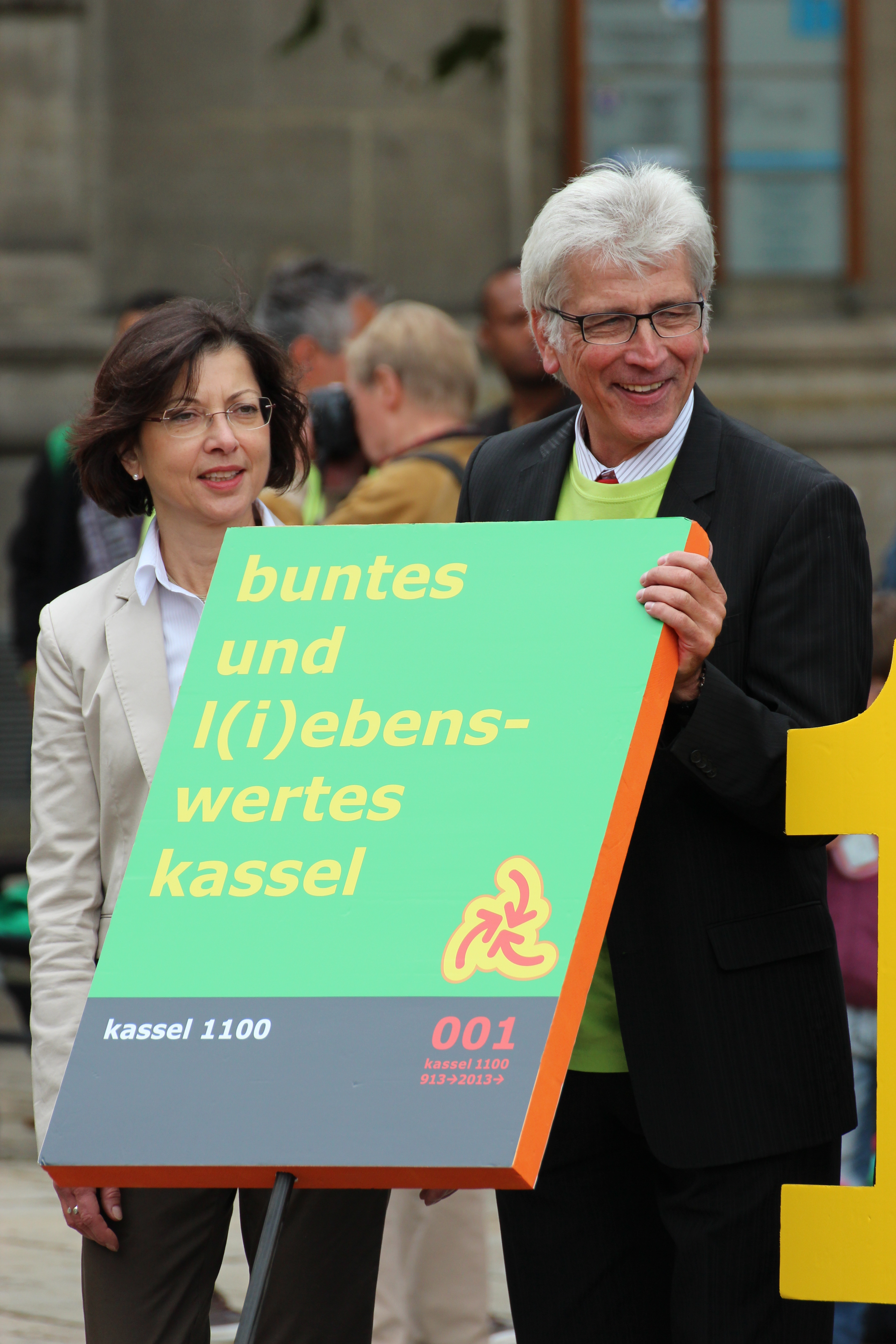 Kassels Oberbürgermeister Bertram Hilgen und seine Lebensgefährtin Margit Berghof-Becker beim Umzug zum Auftakt der Festwoche anlässlich 1100 Jahren Kassels.